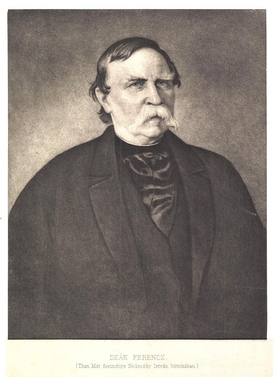 Deák Ferenc. "Régi jeles festőművészünk, Thán Mór 1874-ben festette le Deákot Nedeczky István számára. Nedeczky unokaöcscse és kedveltje volt Deáknak, ki utolsó két nyarát a Nedeczky-családnál töltötte, velük lakott a városligetben 1874-ben a Schwarcz- és 1875-ben a Deutsch-féle villában. Az előbb említett nyaralóban, melynek képét szintén megtalálhatni lapunk mai számában, készült Thán Mór képe, melyhez az «öreg úr», bár akkor már nagyon beteg volt, unokaöcscse iránti szeretetből többször ült. A kép Deák arczképei között a legsikerültebbek egyike, úgy élethűségénél, mint művészi becsénél, jellemzetességénél fogva. Ez a legutolsó Deákról felvett arczkép." Vasárnapi Ujság, 1903. 50. évfolyam 41. szám.